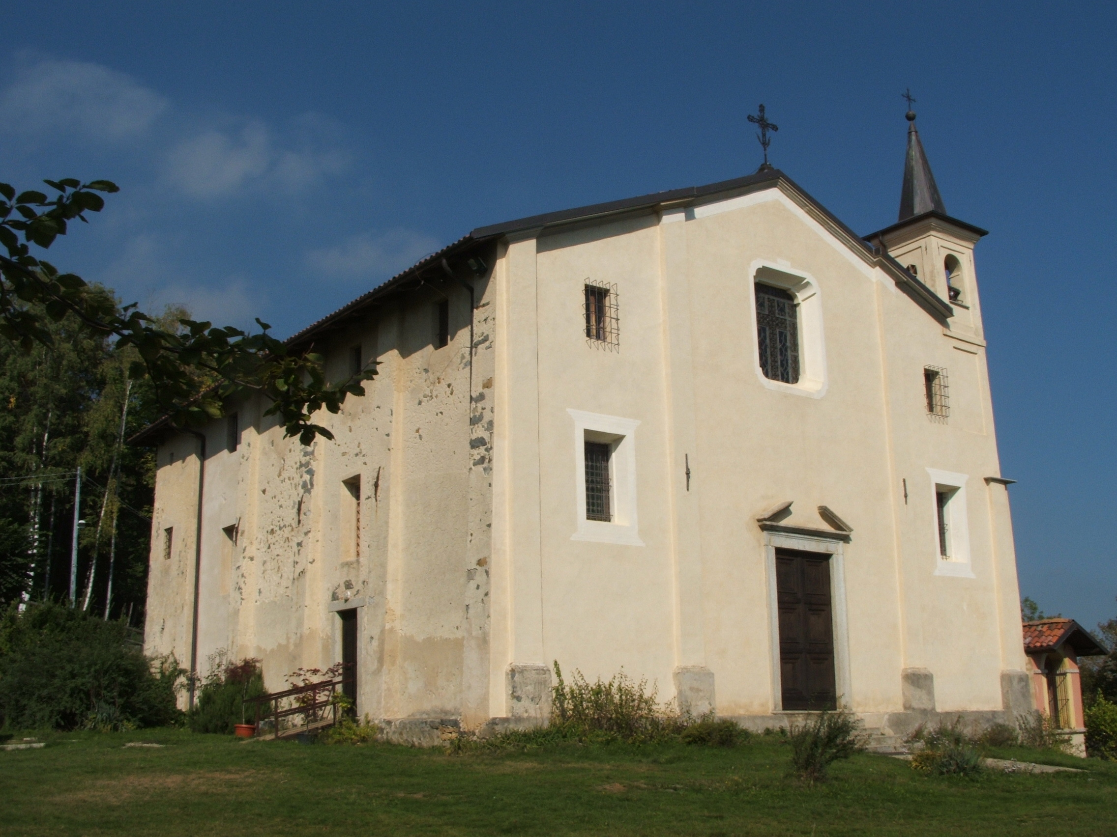 Immagine dal Santuario di Nostra Signora della Brughiera, presso Trivero (provincia di Biella, Piemonte, Italia)